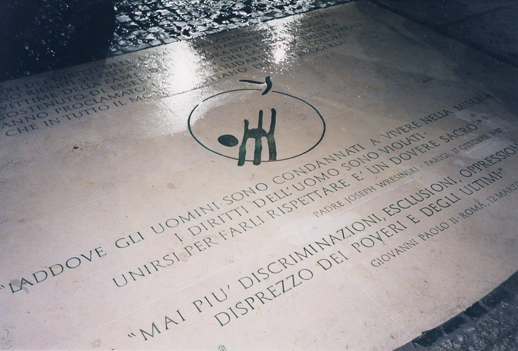 Lapide in onore delle vittime della miseria posta sul Sagrato della Basilica di San Giovanni in Laterano a Roma. Inaugurata il 15 ottobre 2000. Con le parole di padre Joseph Wresinski e di San Giovanni Paolo II